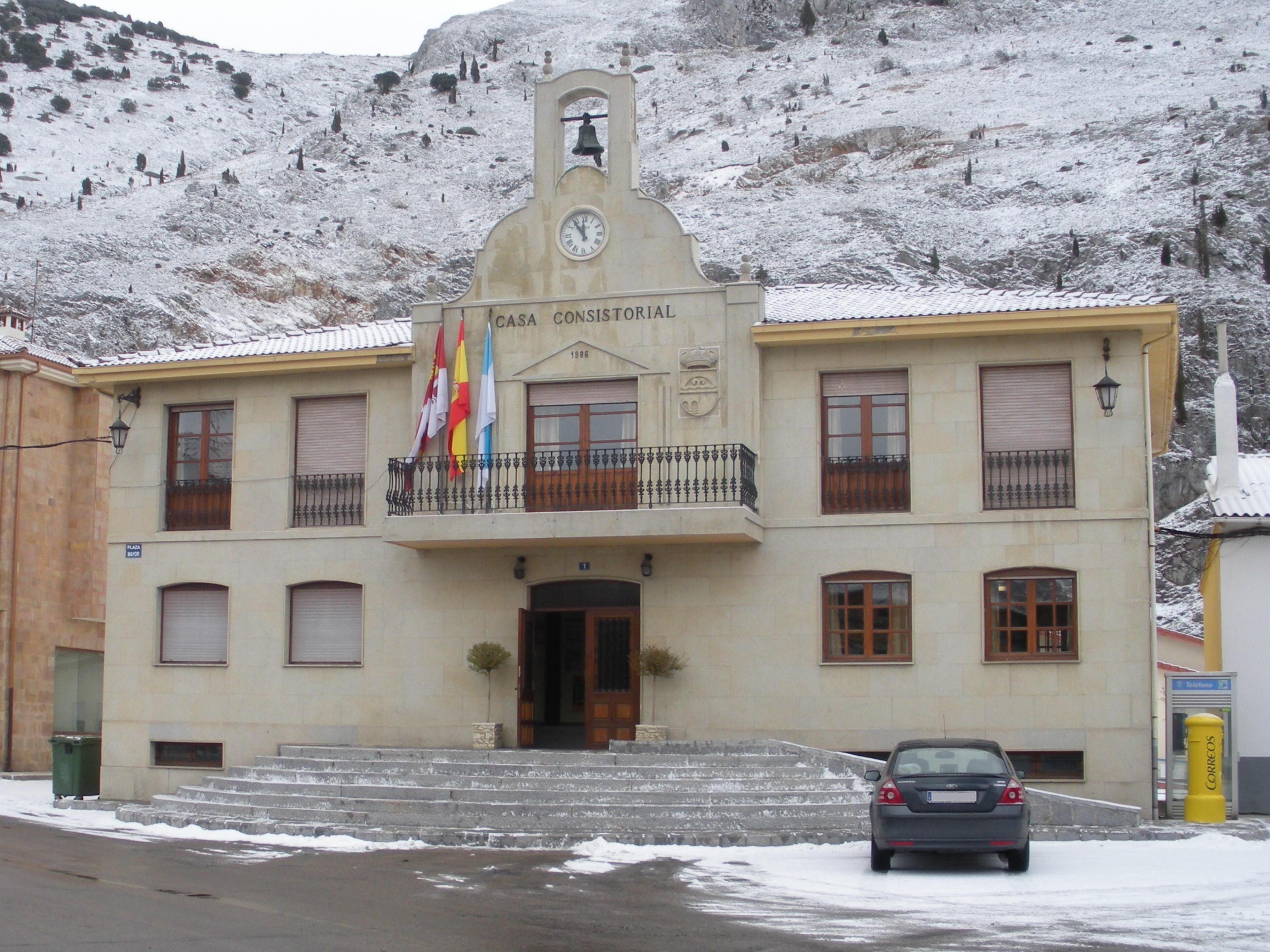 Fachada del ayuntamiento de Velilla del Río Carrión (Palencia).